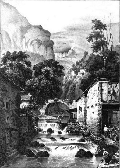 Sassenage (Isère)